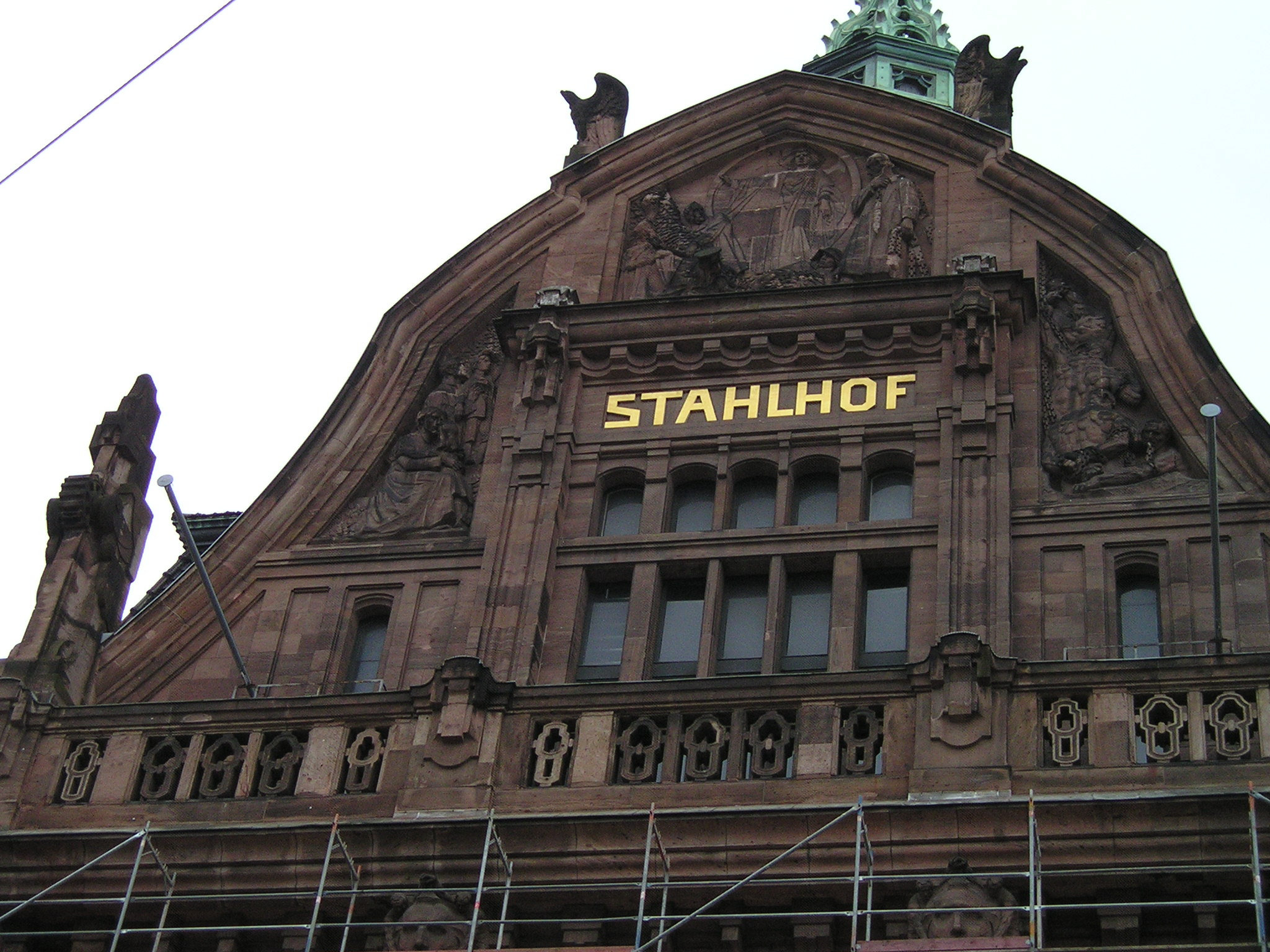 Stahlhof, Dach